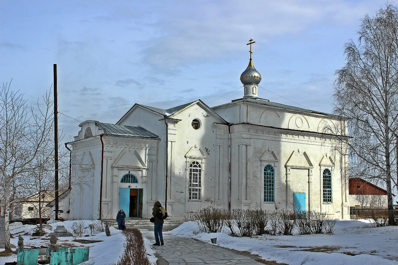 Церковь Вознесения (Челябинская область, Касли, улица Коммуны, у автовокзала)